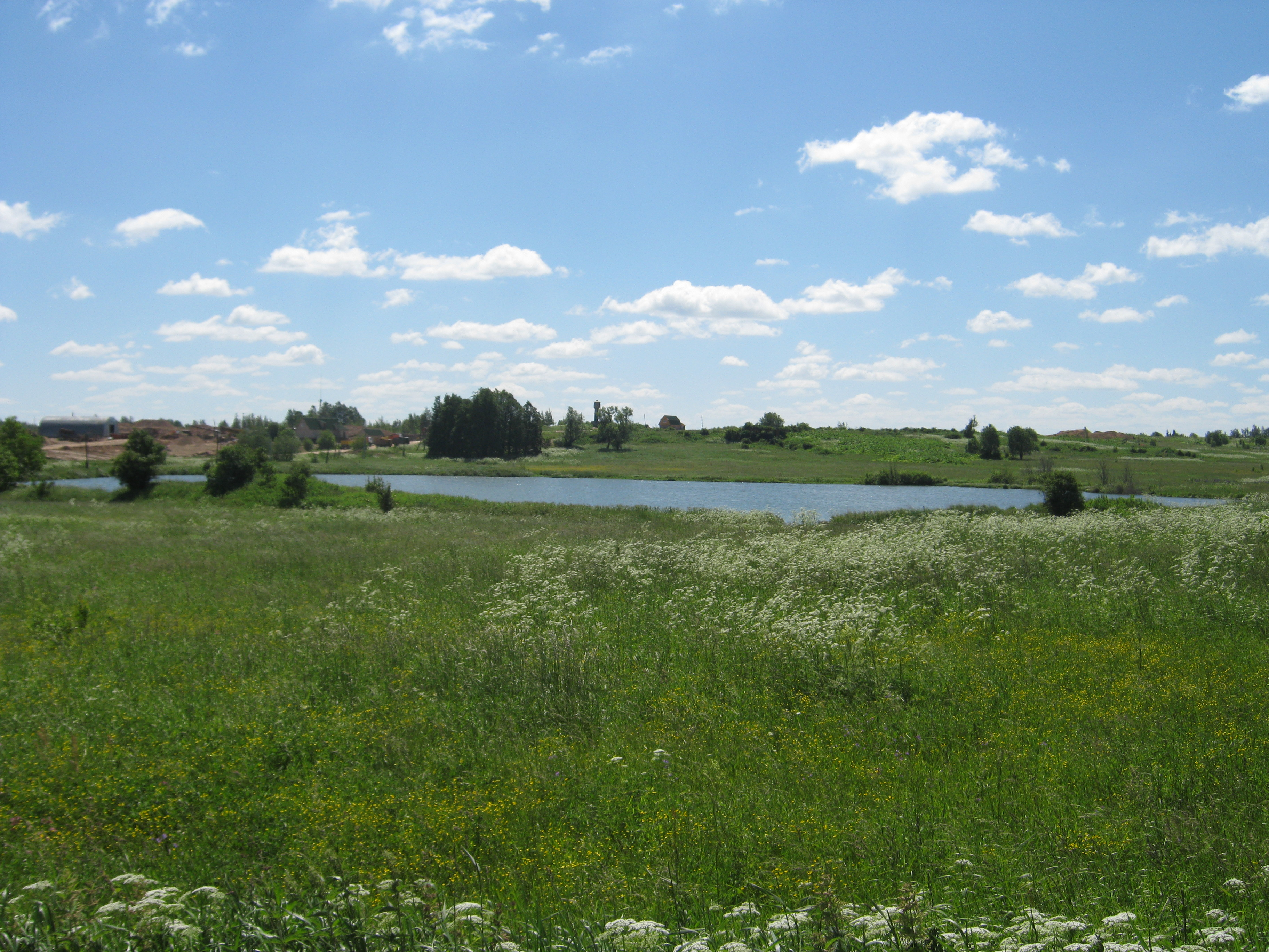 Пруд в деревне Архангельское Шаховского района Московской области